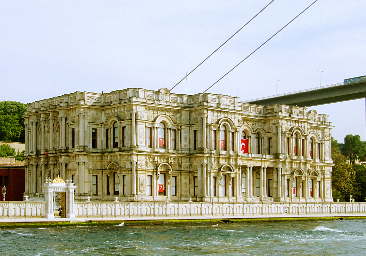 Stambuł, pałac Beylerbeyi, widok z Boforu; Istanbul, Beylerbeyi palace, view from Bosphorus